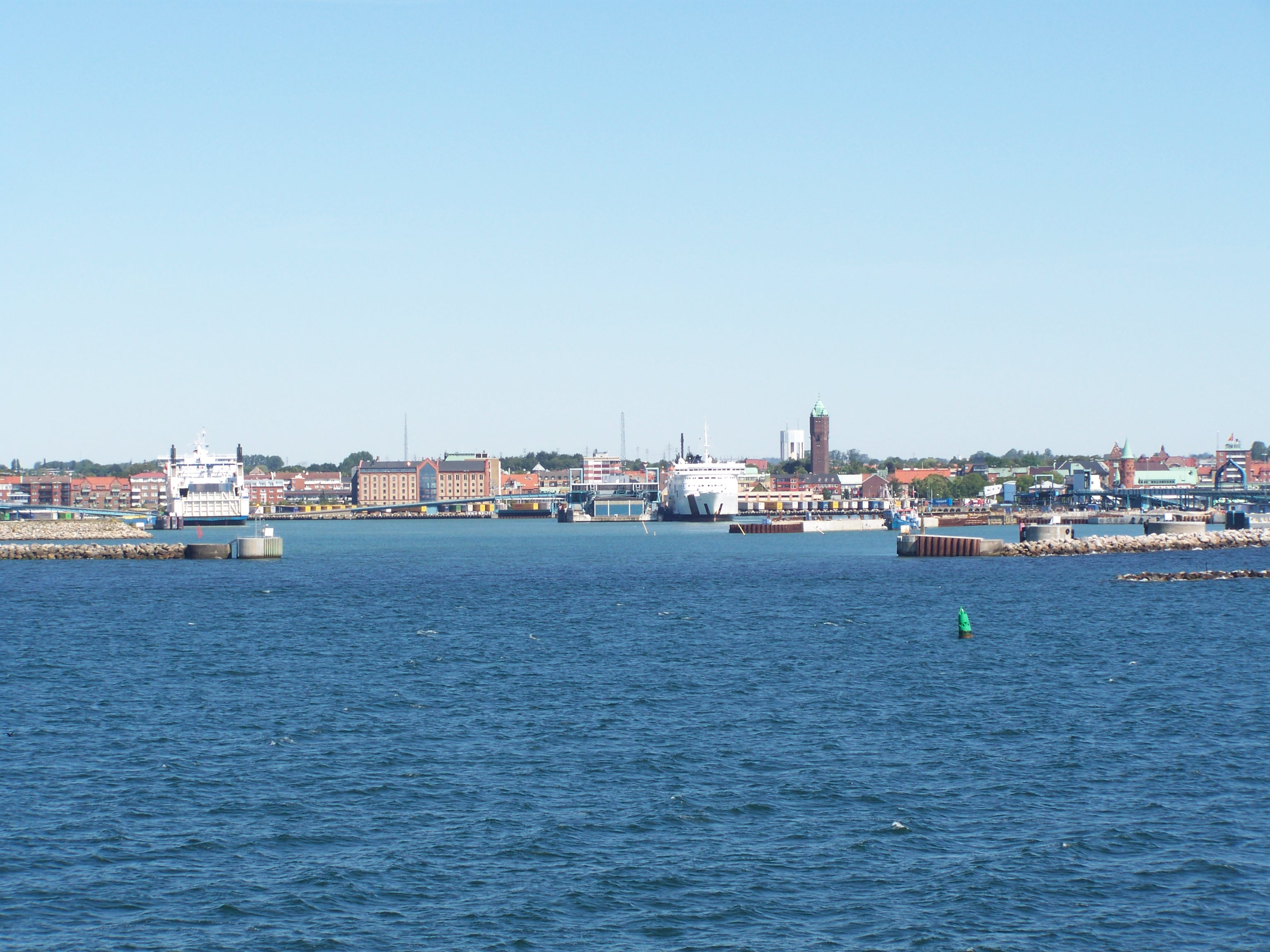 Trelleborg, Hafen, von See aus